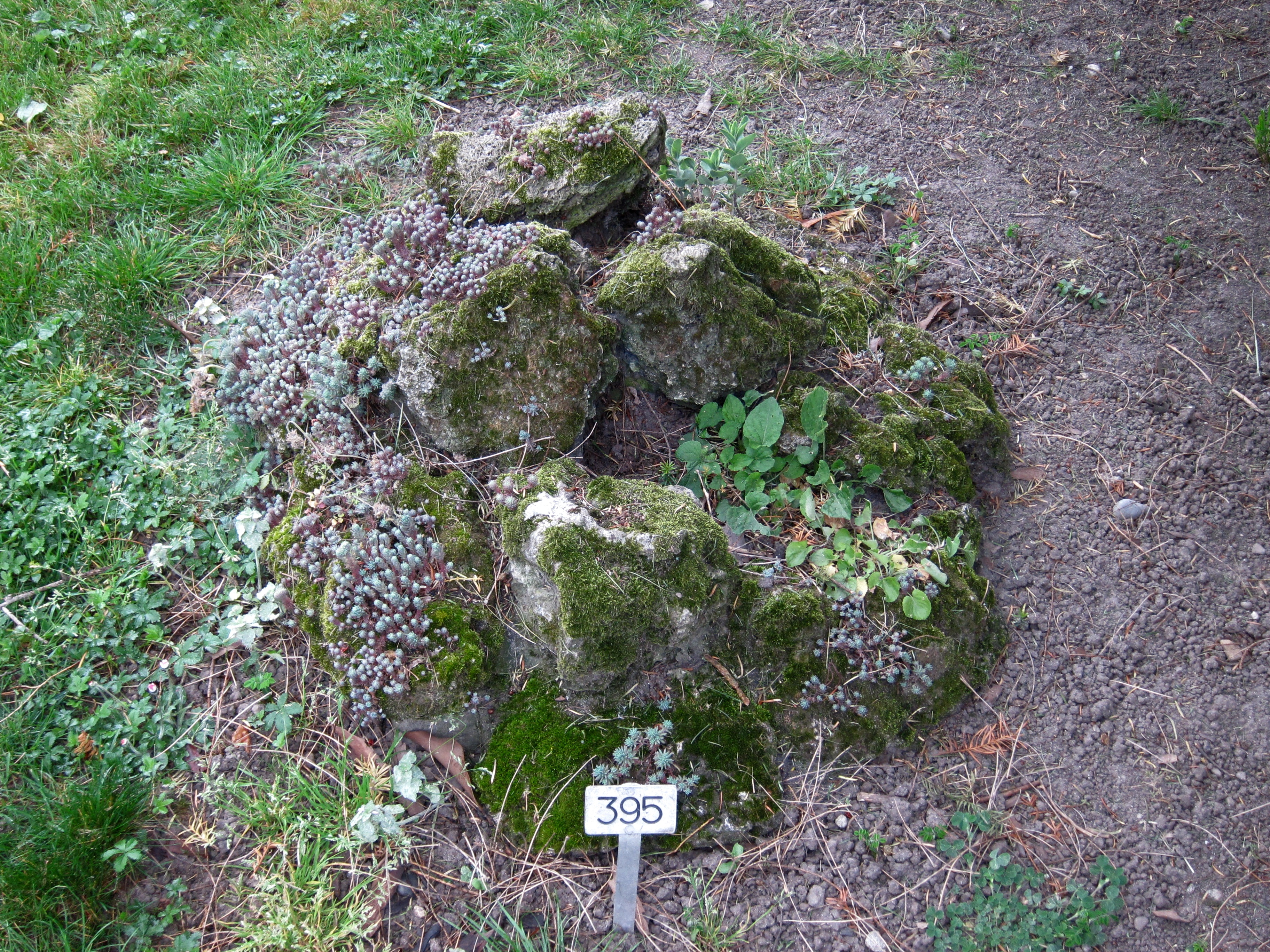 Grab von Jean Piaget in Genf (nicht gekennzeichnet)